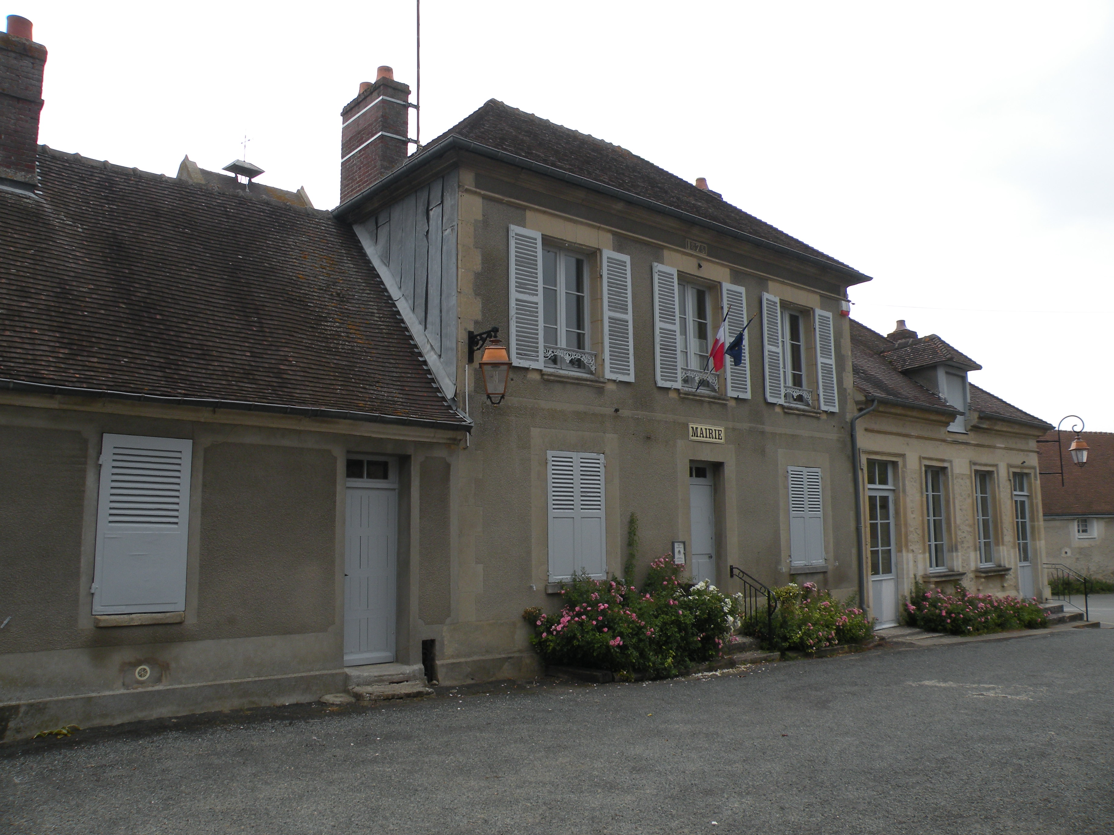 Vaudancourt mairie